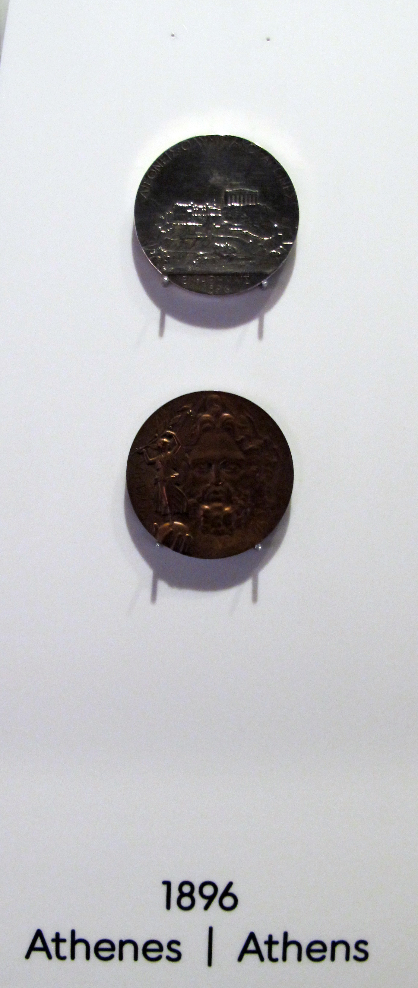 Musée Olympique, Losanna